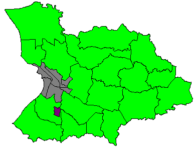 Comunidad Río Cristal, ubicada en el Barrio Sábalos, Mayagüez, Puerto Rico.